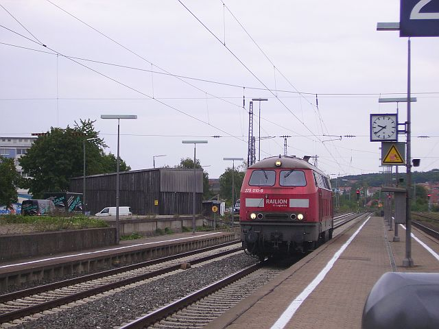 Eine Ex215 (heute 225) durchquert auf Einzelfahrt den Bahnhof Ochsenfurt Richtung Marktbreit. Ein eher ungewöhnliches Motiv auf der Strecke Treuchtlingen-Würzburg.